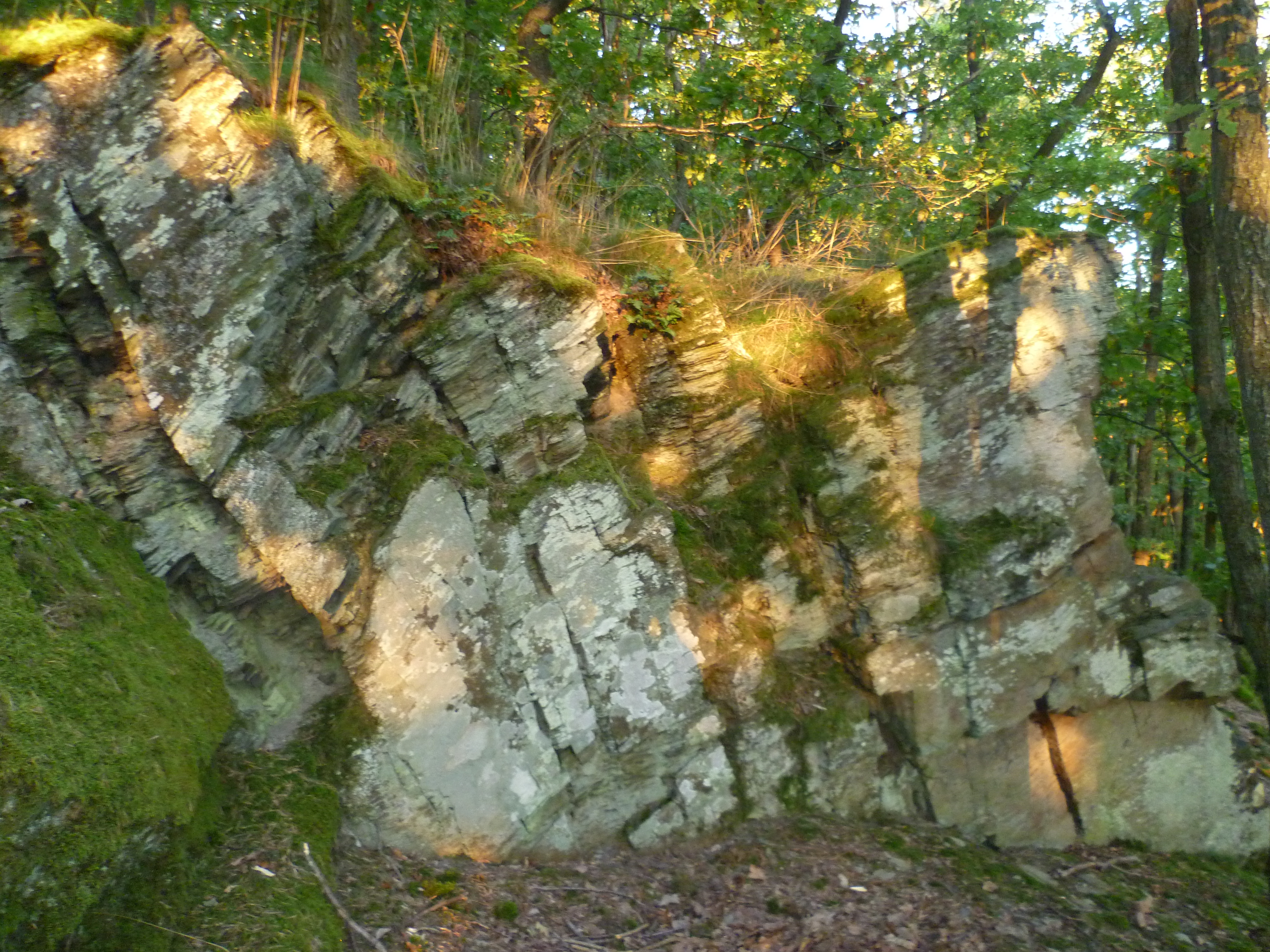 Fels zeigt deutliche Bearbeitungsspuren bei der Burg Holdersberg